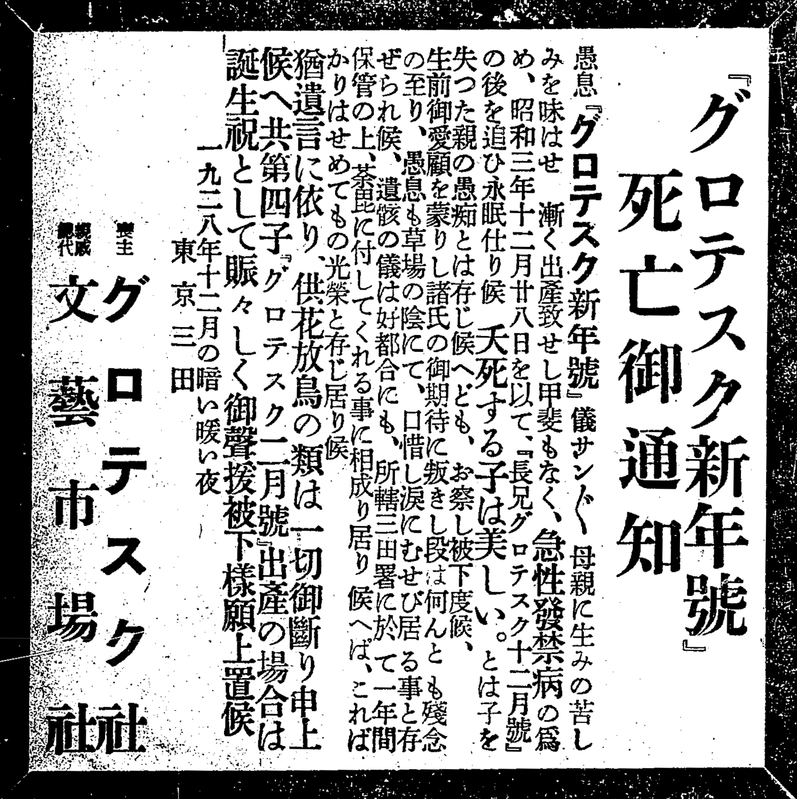 『読売新聞』1928年12月30日号朝刊「グロテスク新年号」死亡御通知／グロテスク社